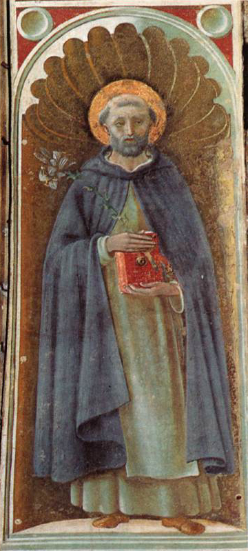 UCCELLO, Paolo St Dominic Fresco, 120 x 46 cm Duomo, Prato